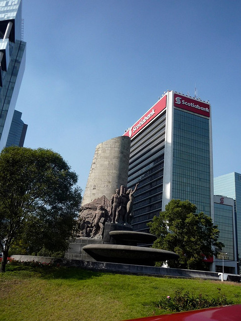 Monumento a Fuente de Petróleos